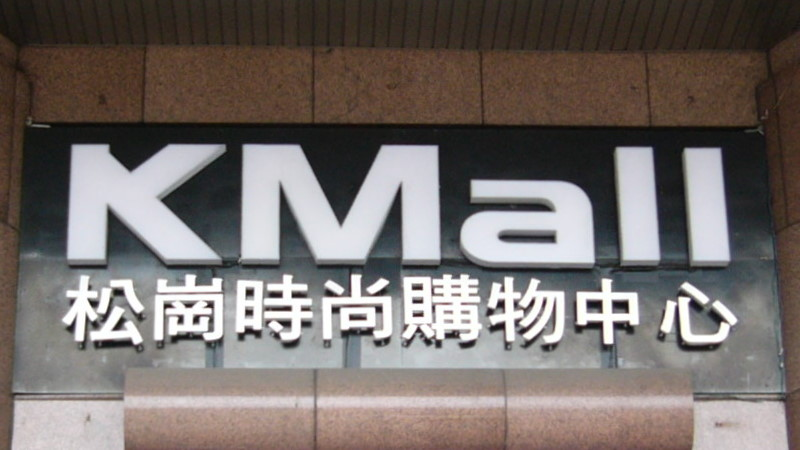 松崗時尚購物中心標準字